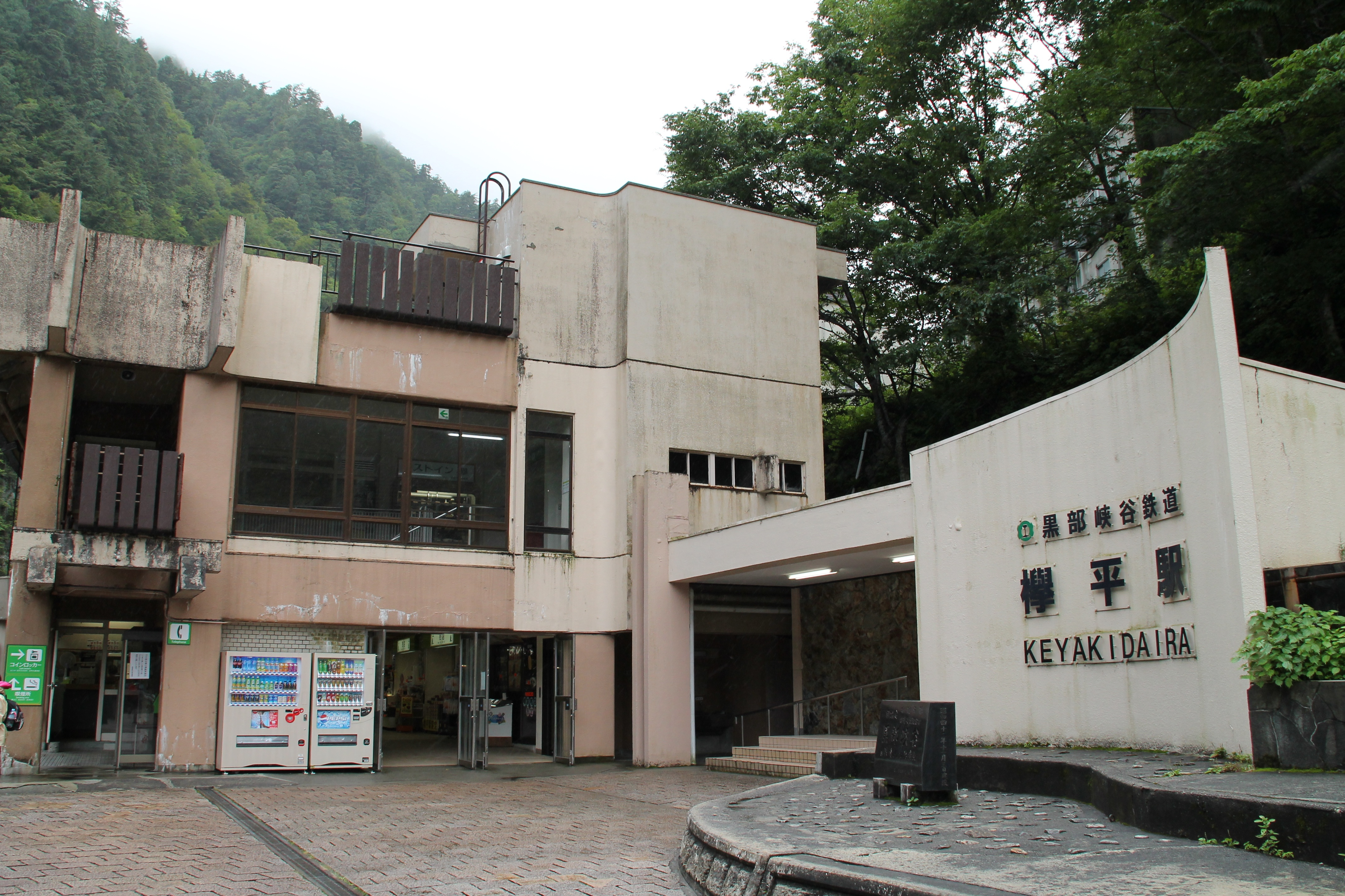 Keyakidaira Sta.